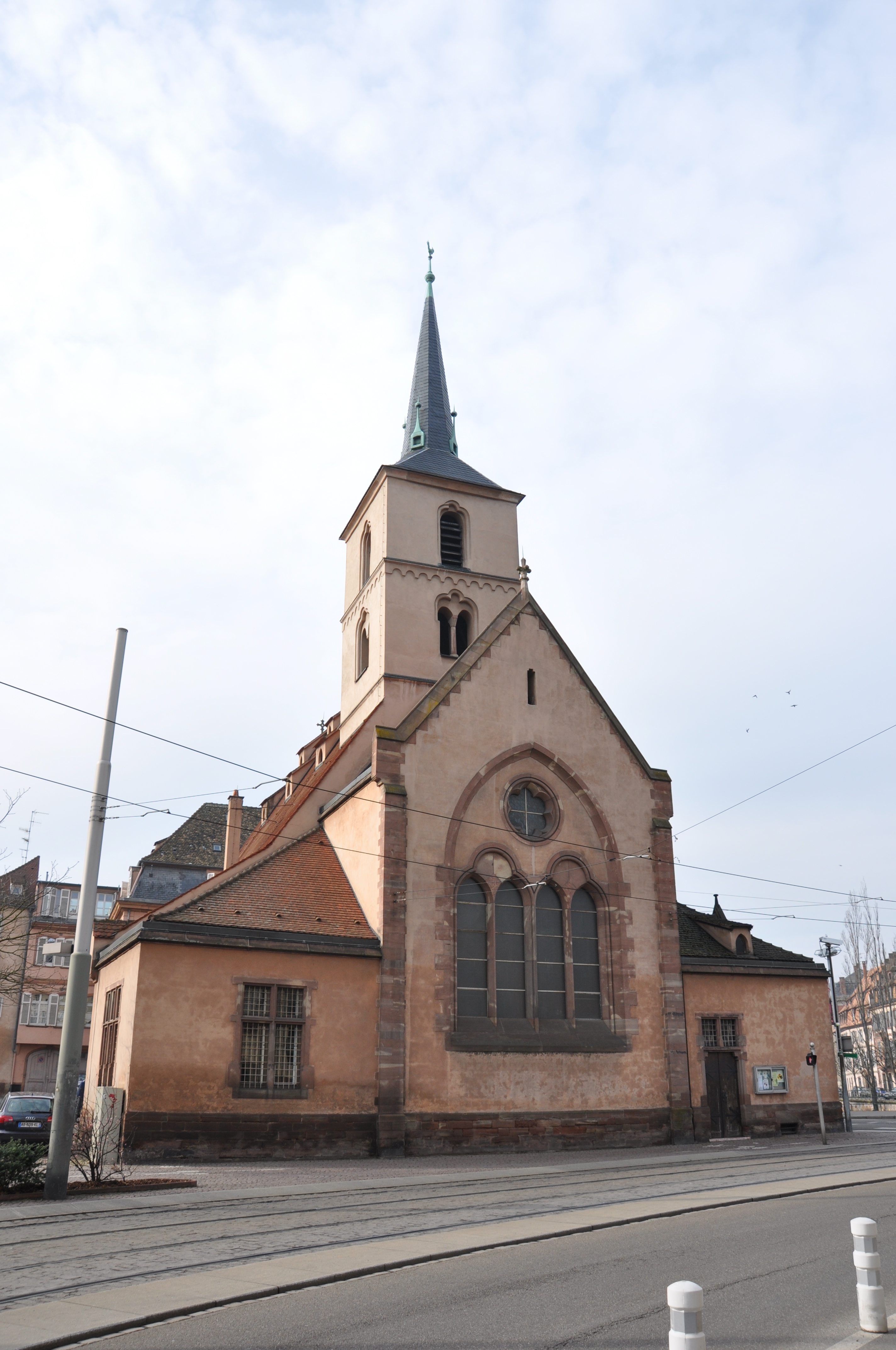 Église Saint-Nicolas de Strasbourg